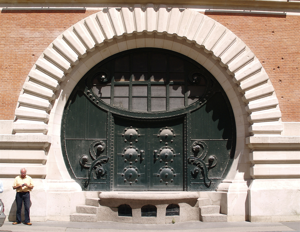 Façade du Cellier d'expédition de la Société de champagne Mumm — 4bis rue de Mars, Reims Champagne-Ardenne, France